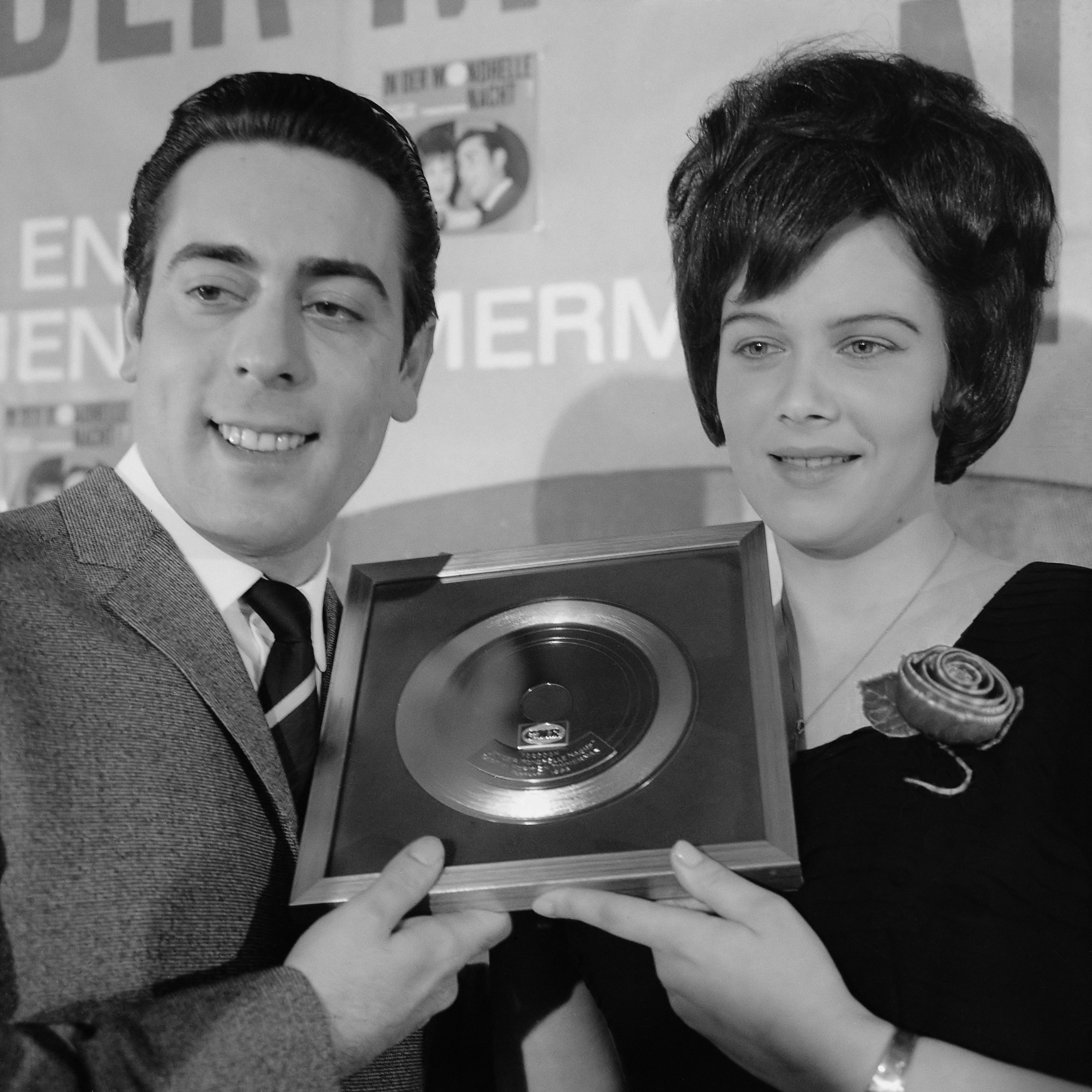 Gouden plaat voor Gert Timmerman en Hermien, In der Mondholle Nacht 3 februari 1966